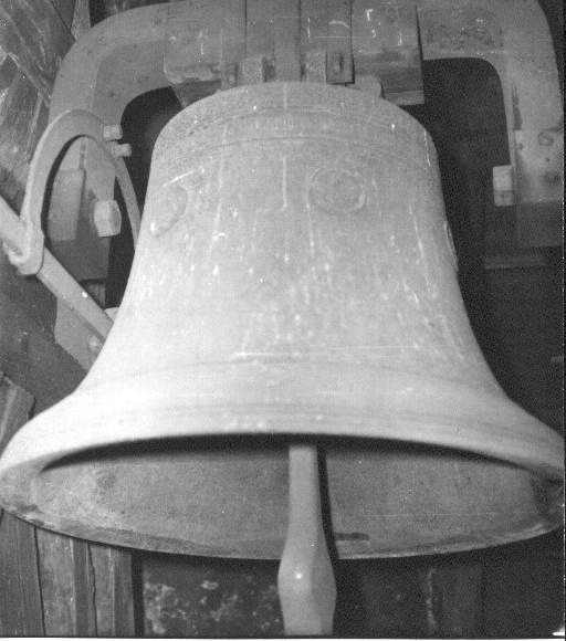 bell, Usti nad Labem, Czech Republic